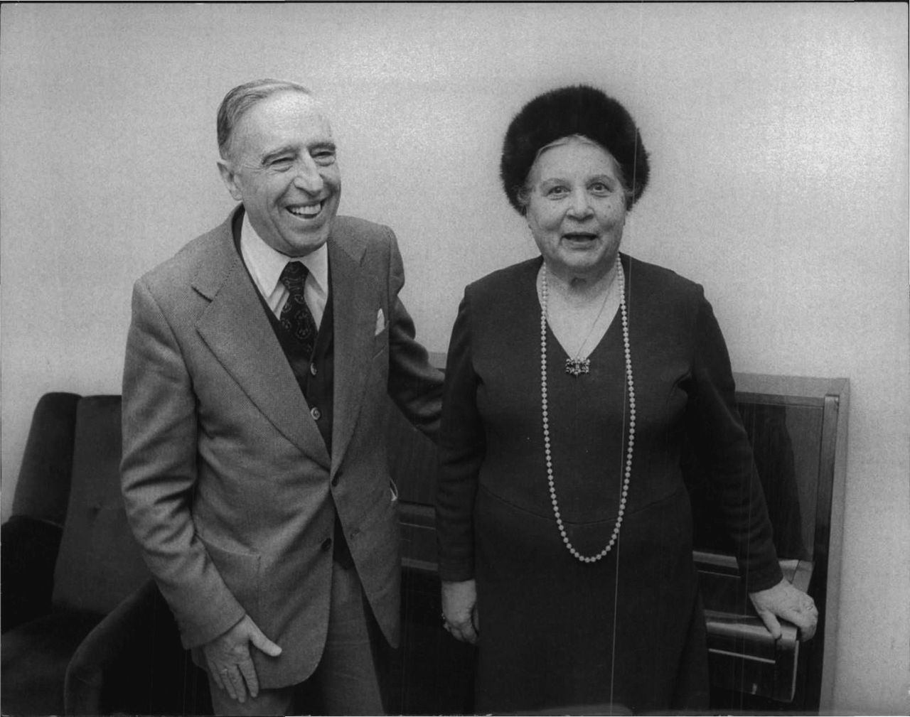 Michelangelo Abbado in compagnia della moglie Maria Carmela Savagnone